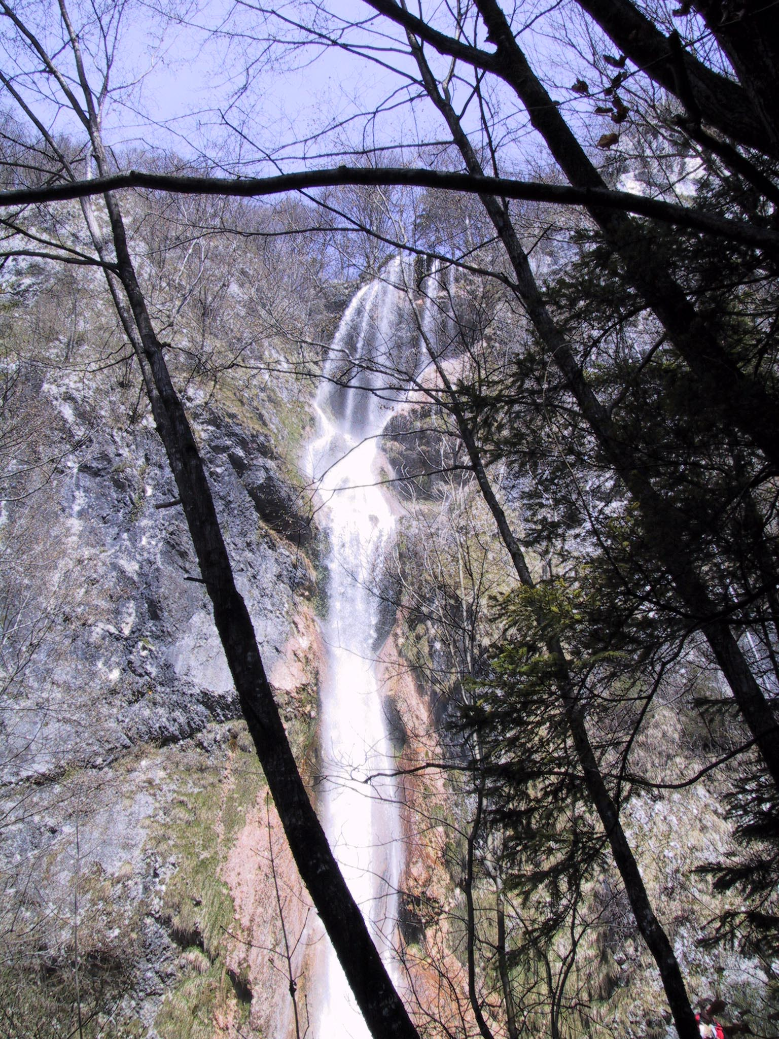 Pirašiški Slap ob visoki vodi